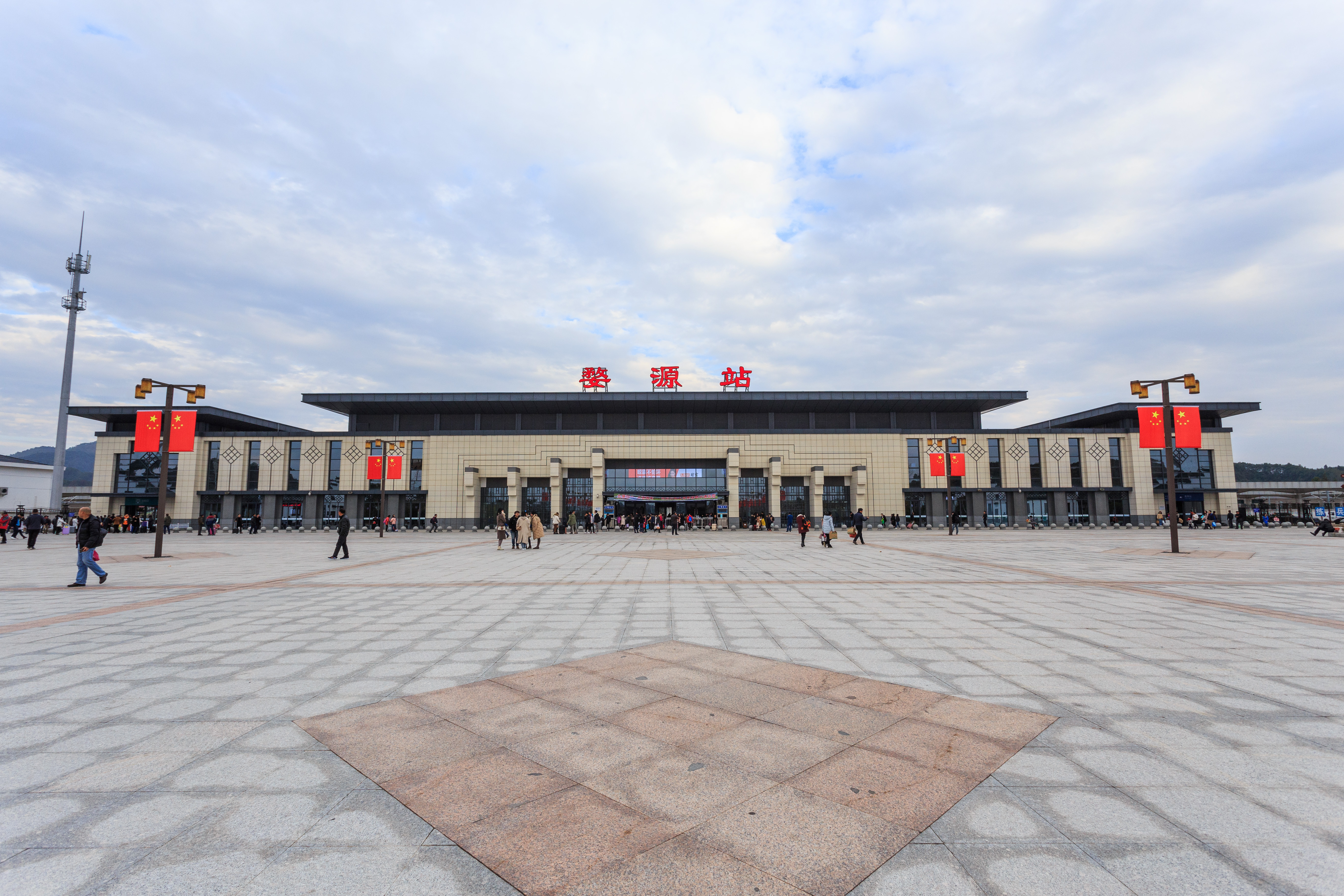 婺源站